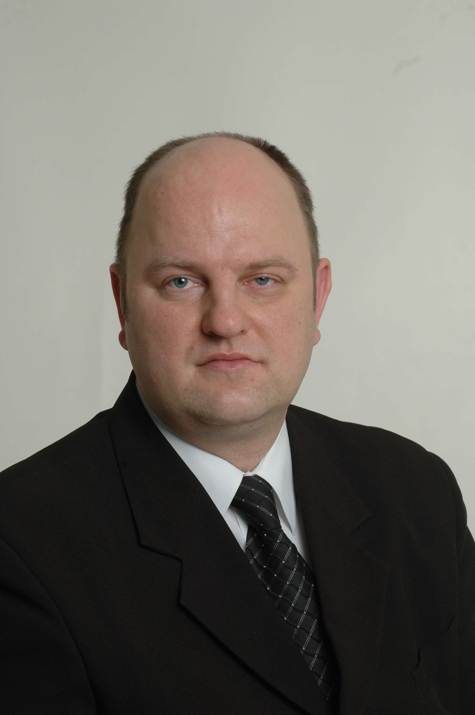 Foto: Saeima